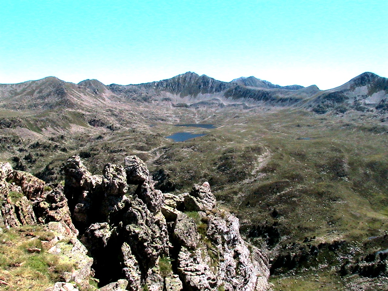 El Tuc de Marimanha des del Cap de Vaqueira (Val d'Aran - Pallars Sobirà) This is a a photo of an emblematic summit in Catalonia, Spain, with id: CE-261062006